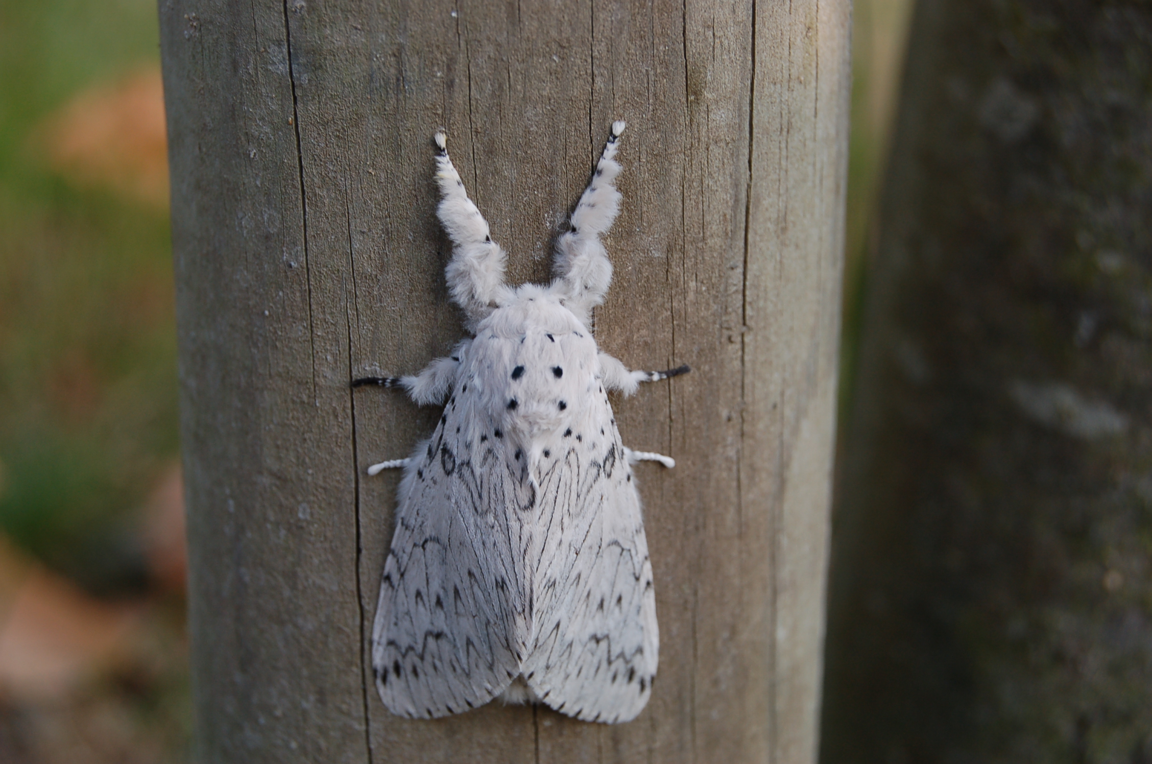 Cerura erminea (Esper, 1783)